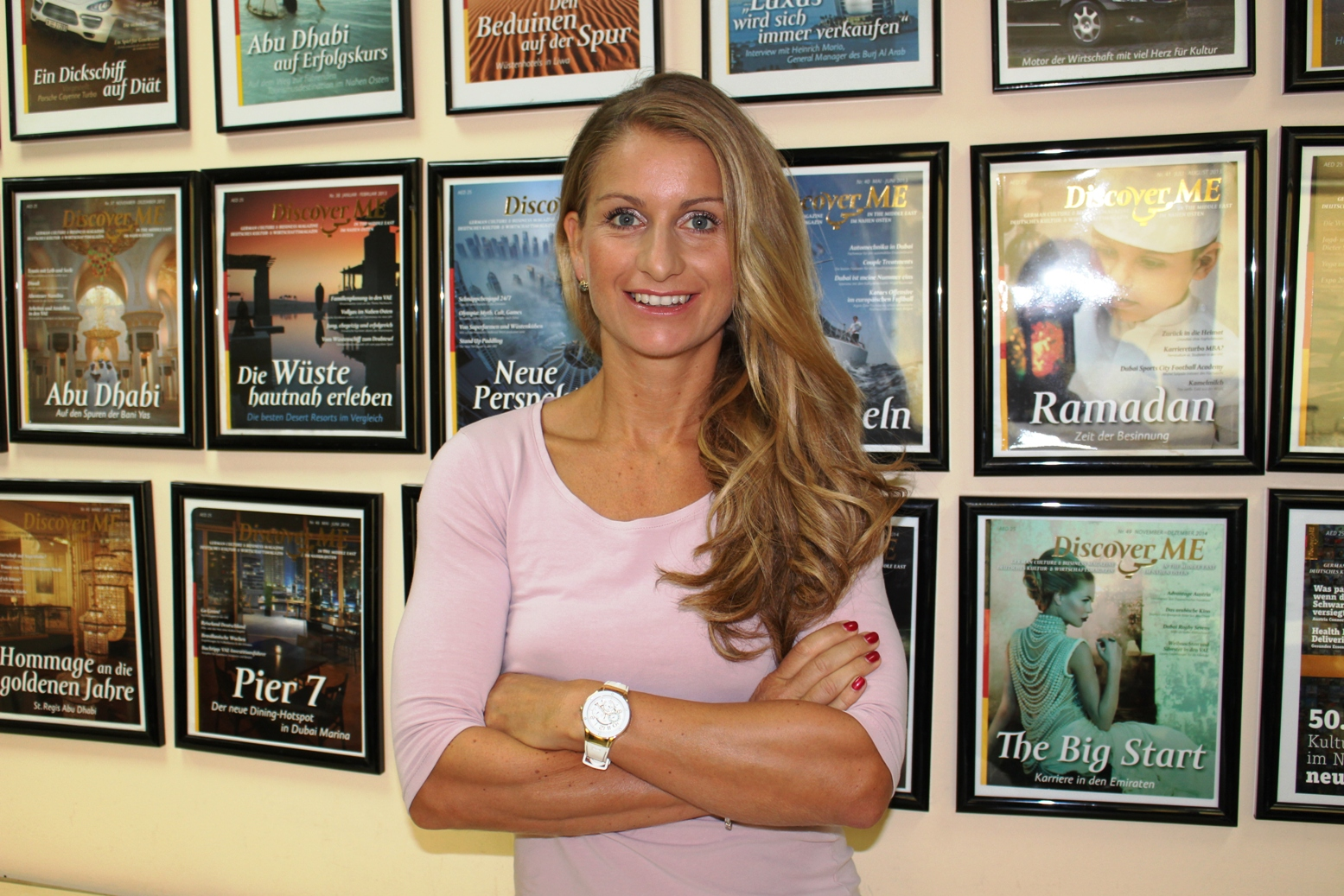 Anne-Susann Becker, Managing Director & Editor-in-Chief von Discover Middle East Publications.